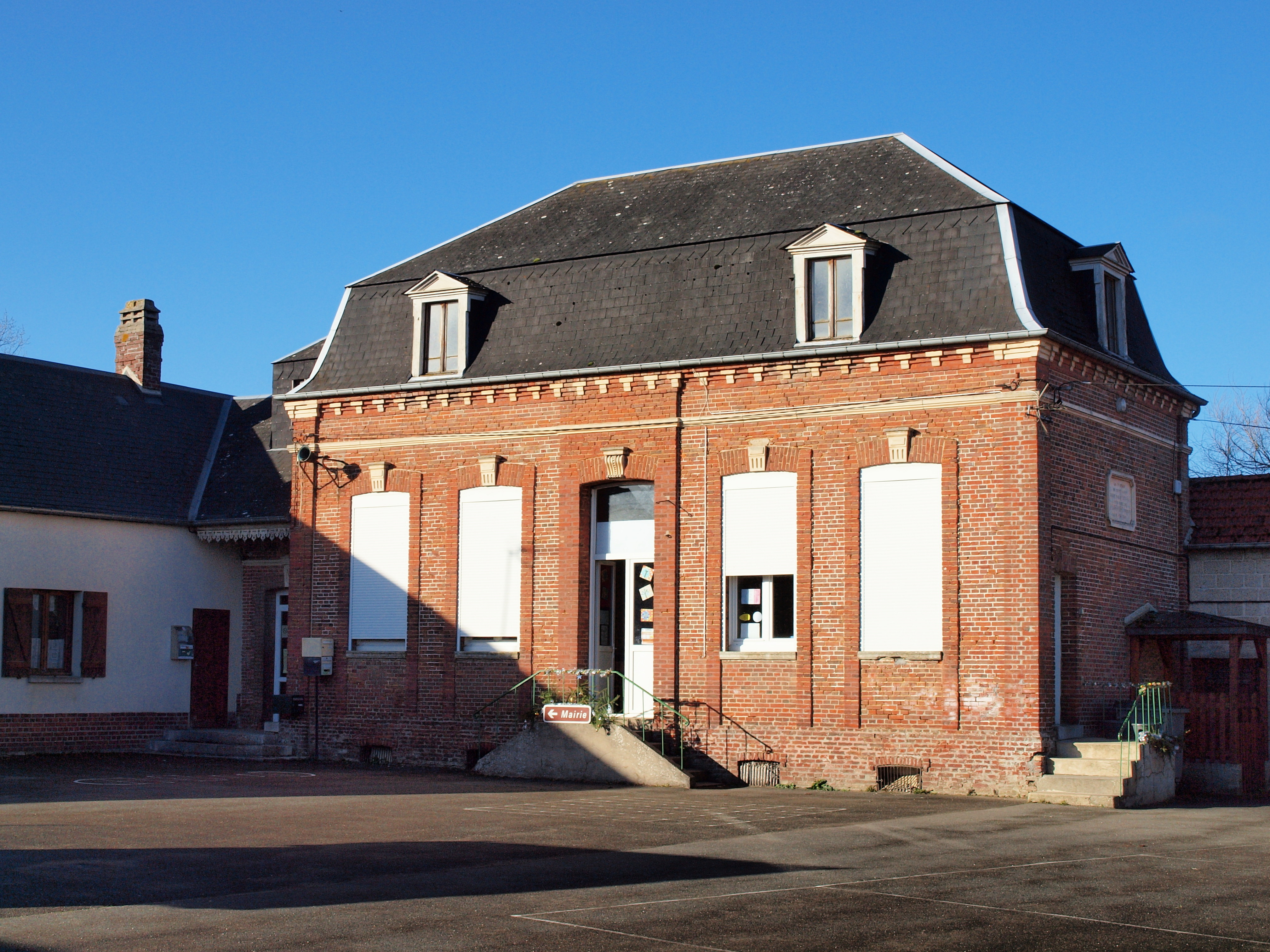 Campneuseville (Seine-Maritime, France)